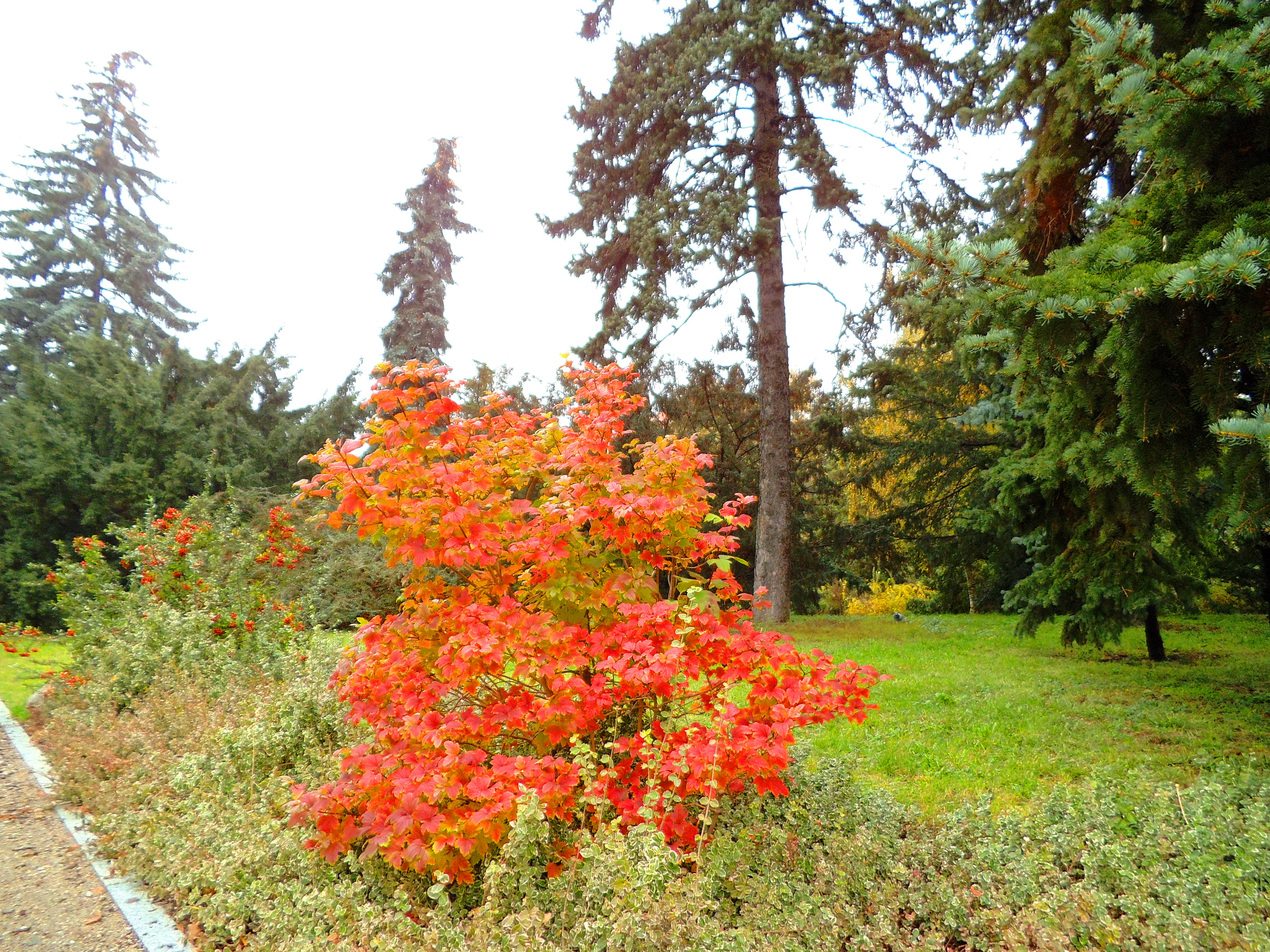 Alpinarium w Toruniu12